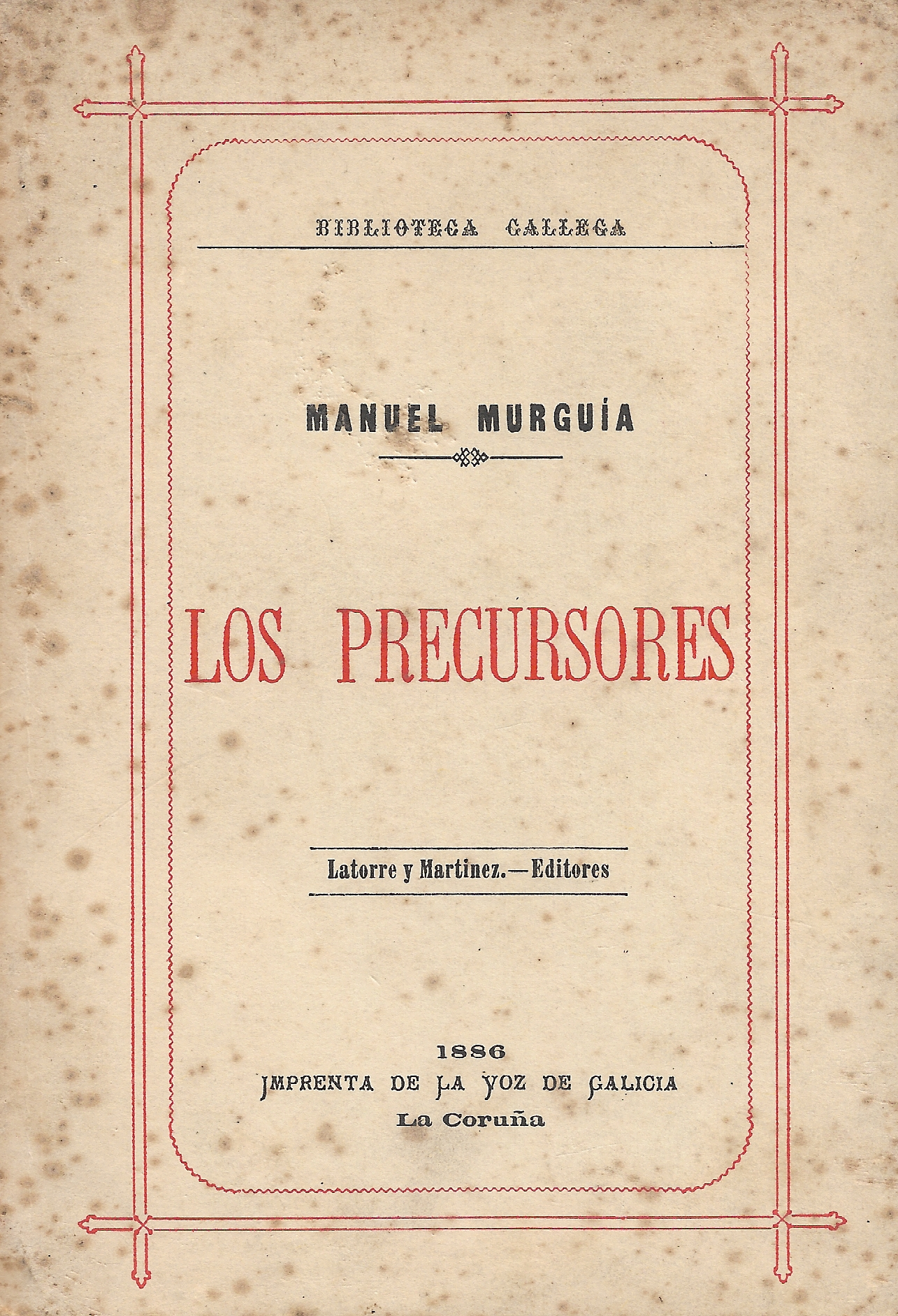 Los precursores: Faraldo, Aurelio Aguirre, Sanchez Deus, Moreno Astray , Pondal, Cendón, Rosalía de Castro, Serafín Avendaño, Viccetto, Ignotus